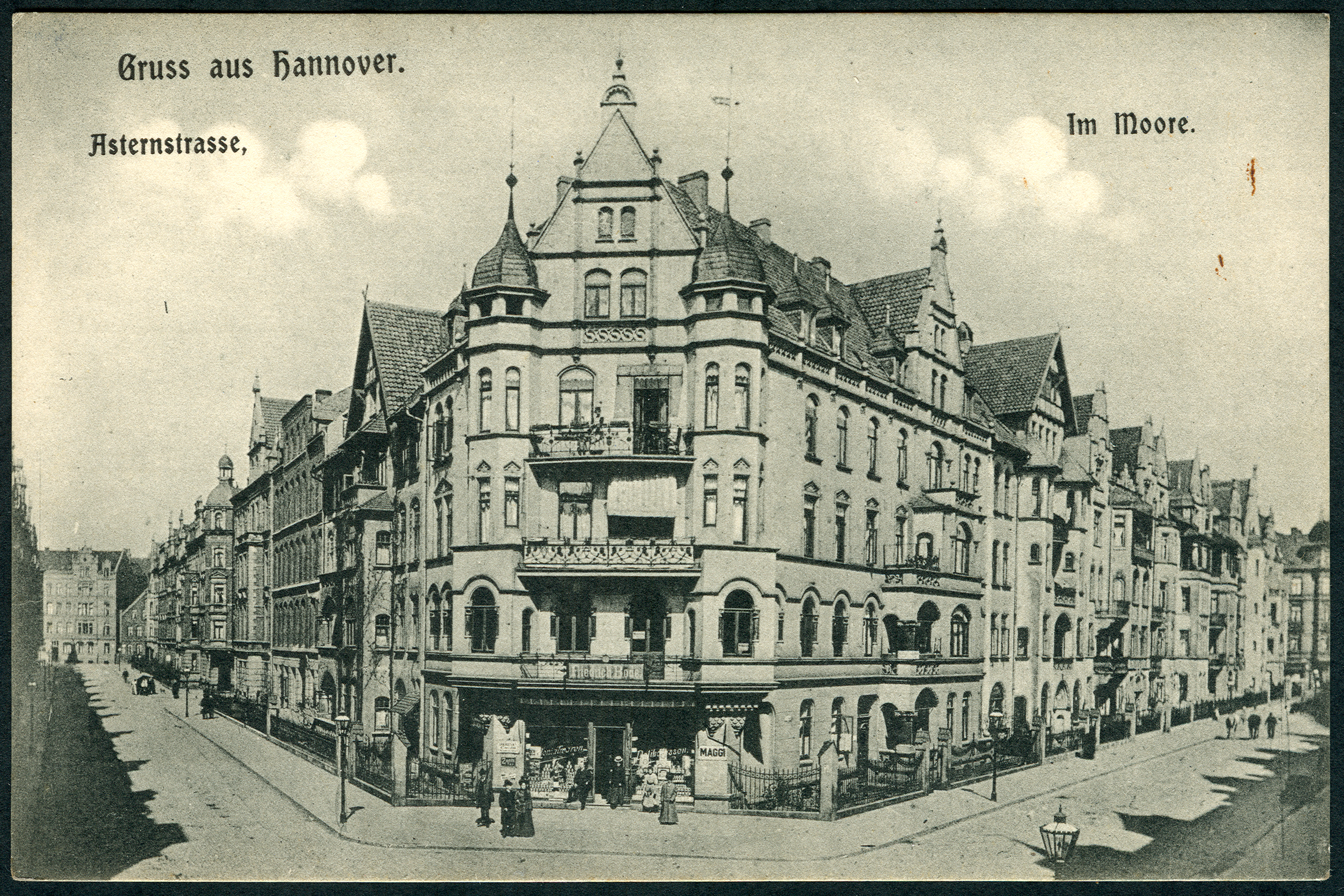 Bildseite der um 1905 von dem Fotografen Ernst August Fischer verlegten Ansichtskarte auf das - heute erhaltene - Eckgebäude Asternstraße und Im Moore in der Nordstadt von Hannover. Für die Aufnahme wählte der selbständige Fotograf, der um 1900 in Hannover mehrere Ateliers betrieb, einen erhöhten Standort in dem dem Eckgebäude gegenüberliegenden Haus ein, um so einen Blick durch die Straßenzüge bis zu der im Hintergrund sichtbaren Bebauung in der Hahnenstraße zu ermöglichen. Es ist kein Zufall, dass die Gruppe von Personen vor der "Colonialwaren- und Delikatessenhandlung von Friedrich Bode posieren ...